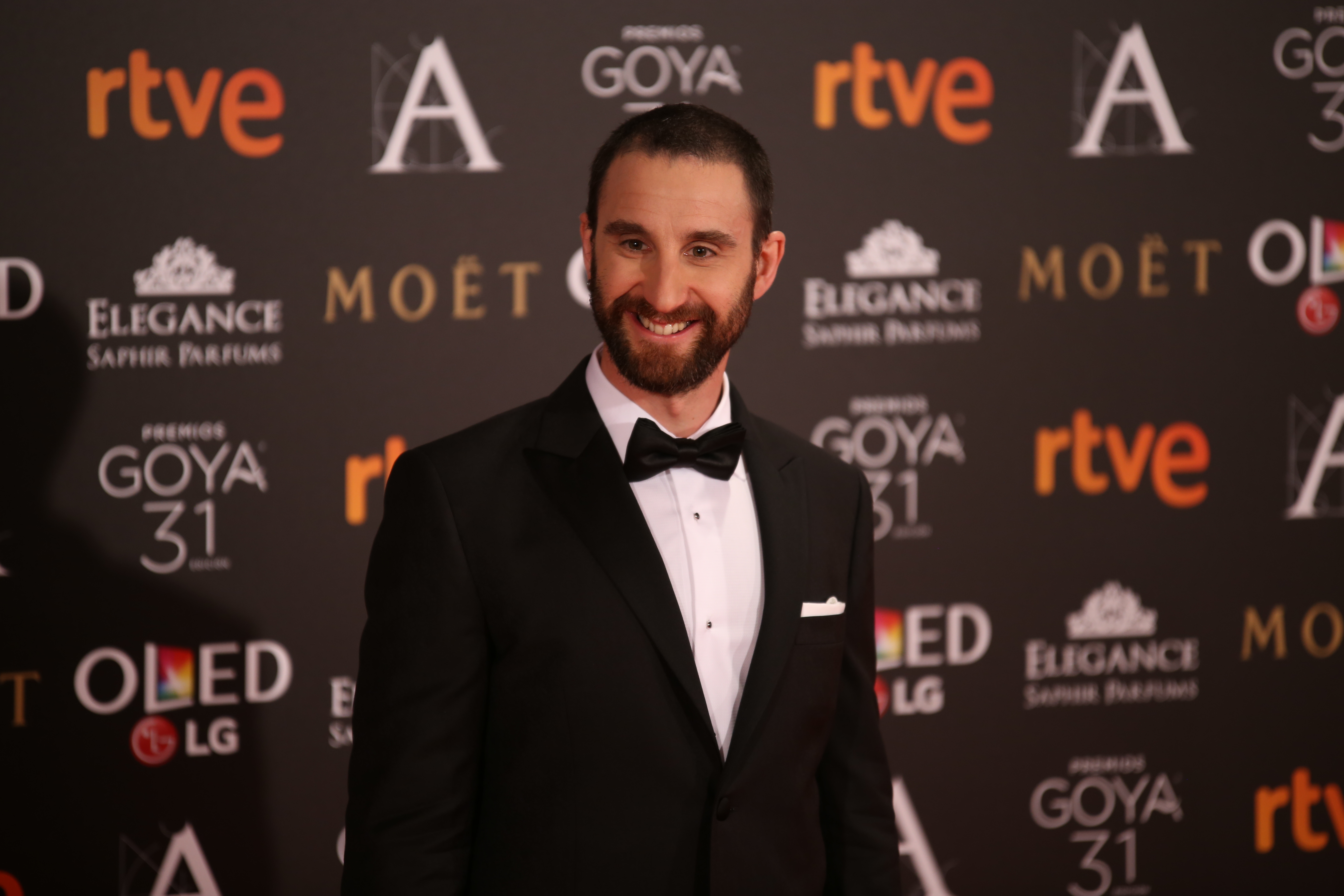 Dani Rovira en la gala de los Premios Goya 2017